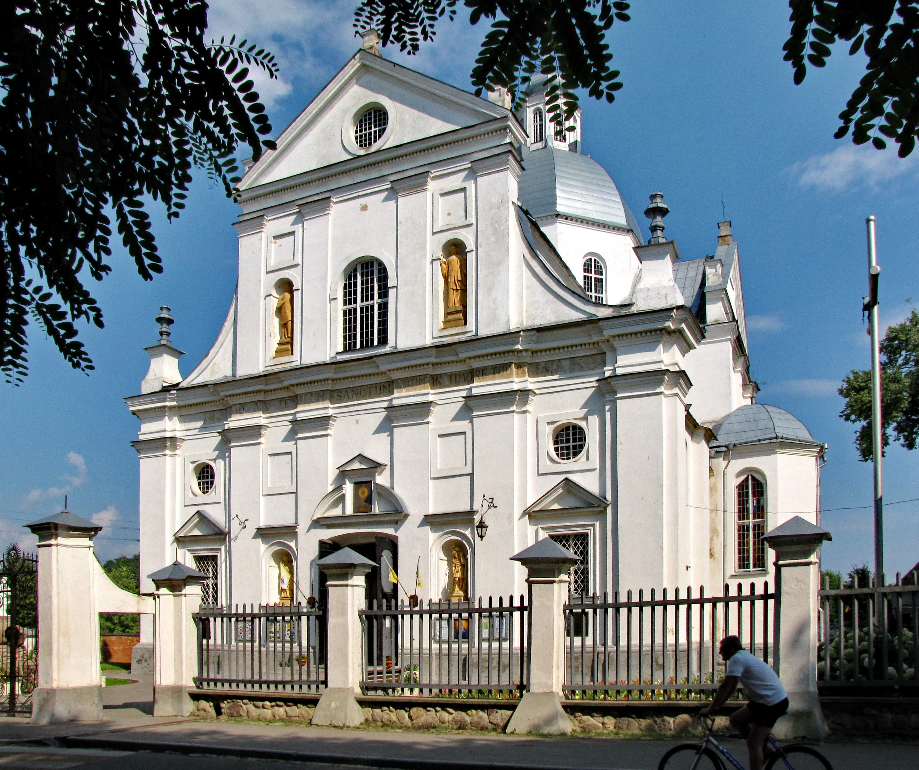 Беларуская (тарашкевіца): Комплекс былога кляштара езуітаў:касьцёл Божага Цела з дэкаратыўным аздабленьнем:росьпісы ў інтэр’еры, выкананыя пад кіраўніцтвам К. Д. Гескага; алтарная карціна «Тайная вячэра» К. Д. Гескага;надмагільныя помнікі і барэльефы: Мікалая Крыштапа Радзівіла Сіроткі, Канстантына Радзівіла, Эльжбеты Яўфіміі Радзівіл, Крыштапа Радзівіла, Ігната Мураўскага, Канстанцыі Радзівіл, Людвіка Кандратовіча (У. Сыракомля);скульптуры на галоўным фасадзе:Сьв. Крыштапа, Сьв. Мікалая, Сьв. Францішка Ксаверыя, Ігнація Лаёлы;пахавальная крыпта роду Радзівілаў (70 трун-саркафагаў, канопа і урна з прахам);вежа;капліца Булгарына;агароджа з брамай. г. Нясьвіж This is a photo of Belarusian heritage monument. Reference number: 610Г000465 ( WLM)